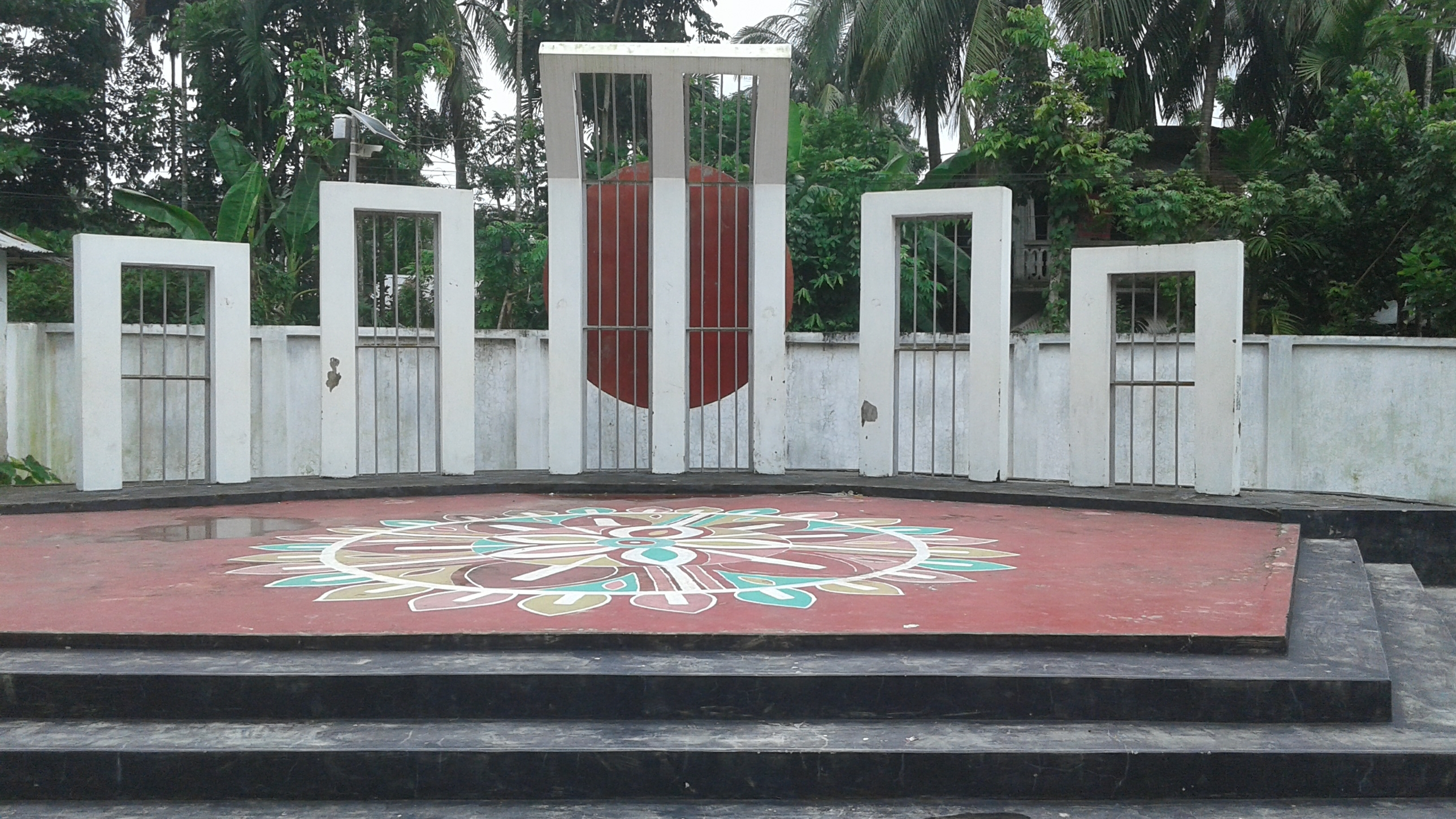 চরফ্যাসন সরকারি কলেজ, শহীদ মিনার এটা বিজ্ঞান ভবন এর সামনে অবস্থিত।